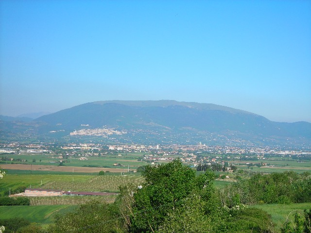 Mount Subasio, Assisi, Perugia, Umbria, Italy